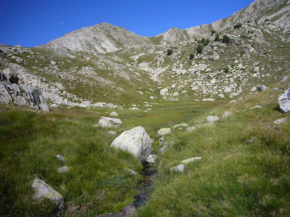 els Cacos; la Vall de Boí, Alta Ribagorça, Catalunya